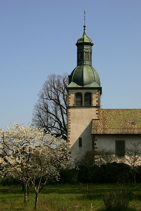 Kirche in Hermance